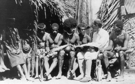 攝於1918年。作者: 不明。 照片版權於1989年屆滿。